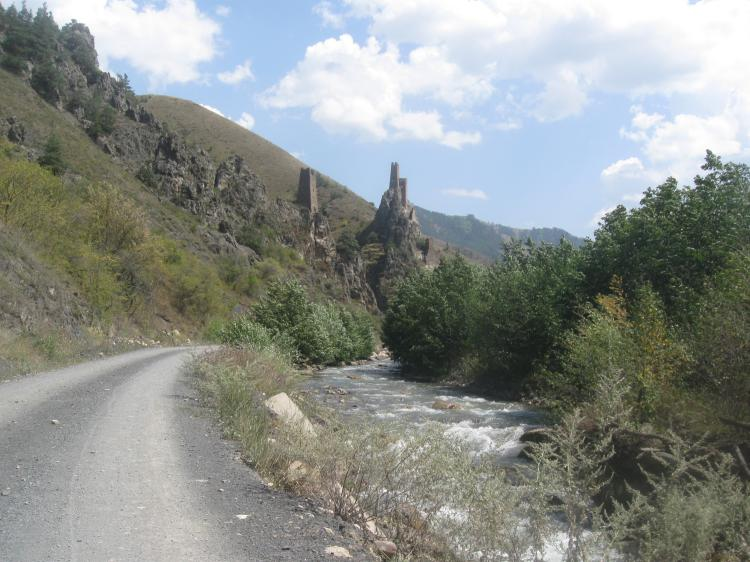 Вторая башня Вовнушки